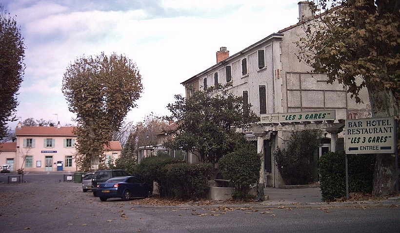 L'hôtel Les trois gares, à Meyrargues (Bouches-du-Rhône). Au fond, la seule gare encore existante (sur la ligne Marseille - Briançon)